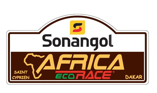 Plaque Rallye Sonangol Africa Eco Race 2012